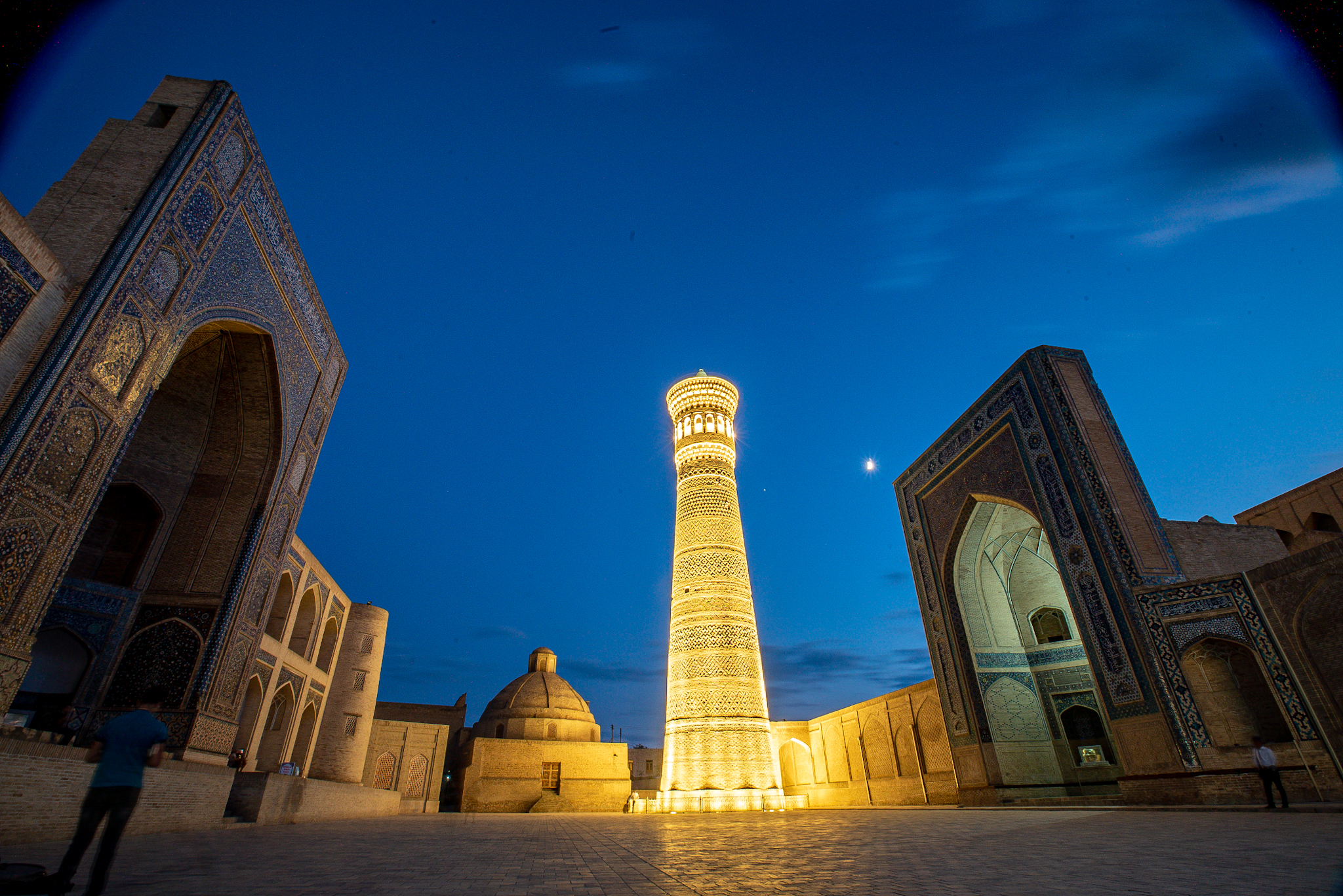 این عکس توسط پوریا افخمی در حاشیه ضبط برنامه تلویزیونی بلور بنفش به کارگردانی بهزاد بلور در شهر بخارا ثبت شده است.